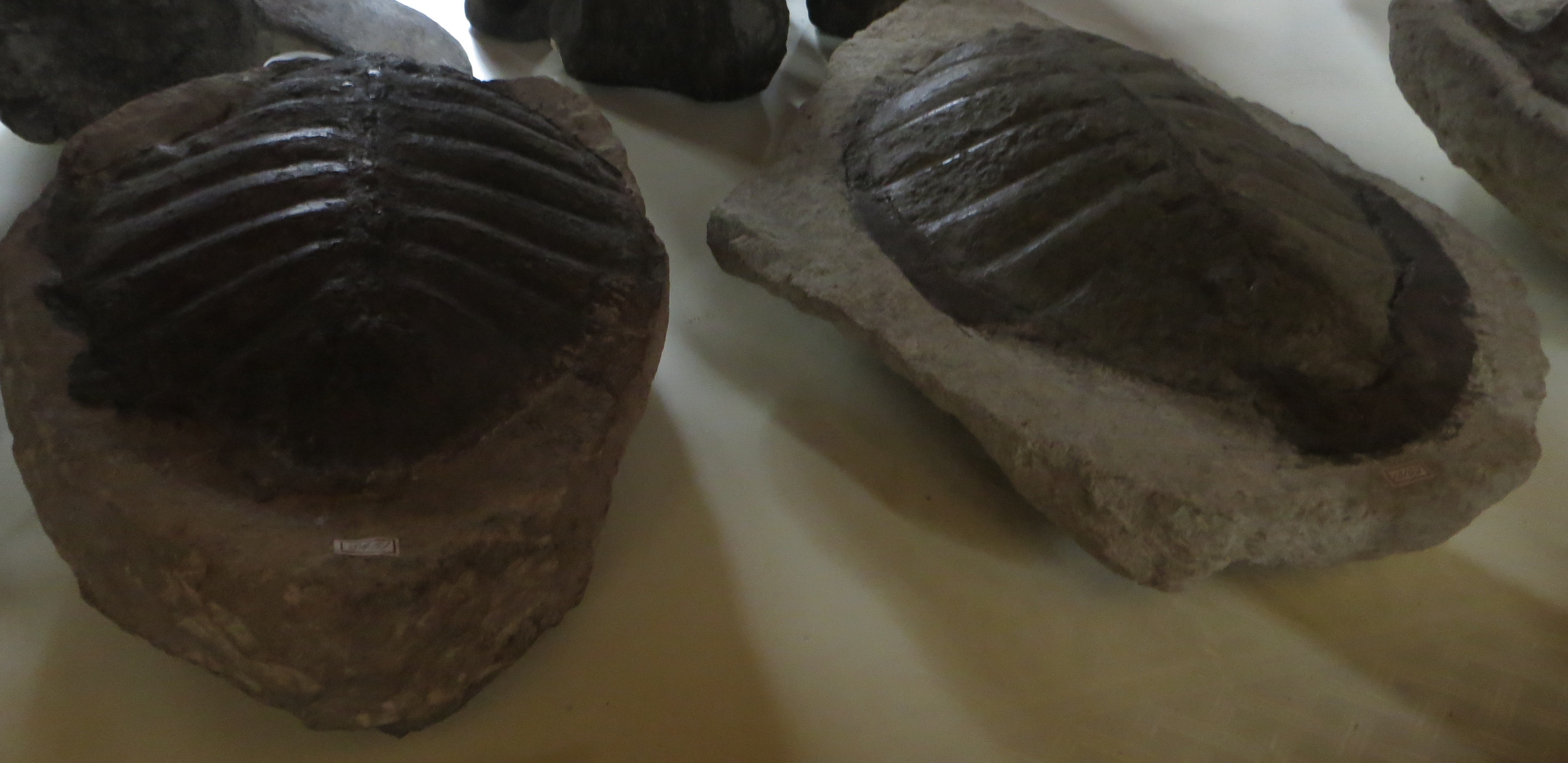 Fossil- Took the picture at Teylers Museum, Haarlem